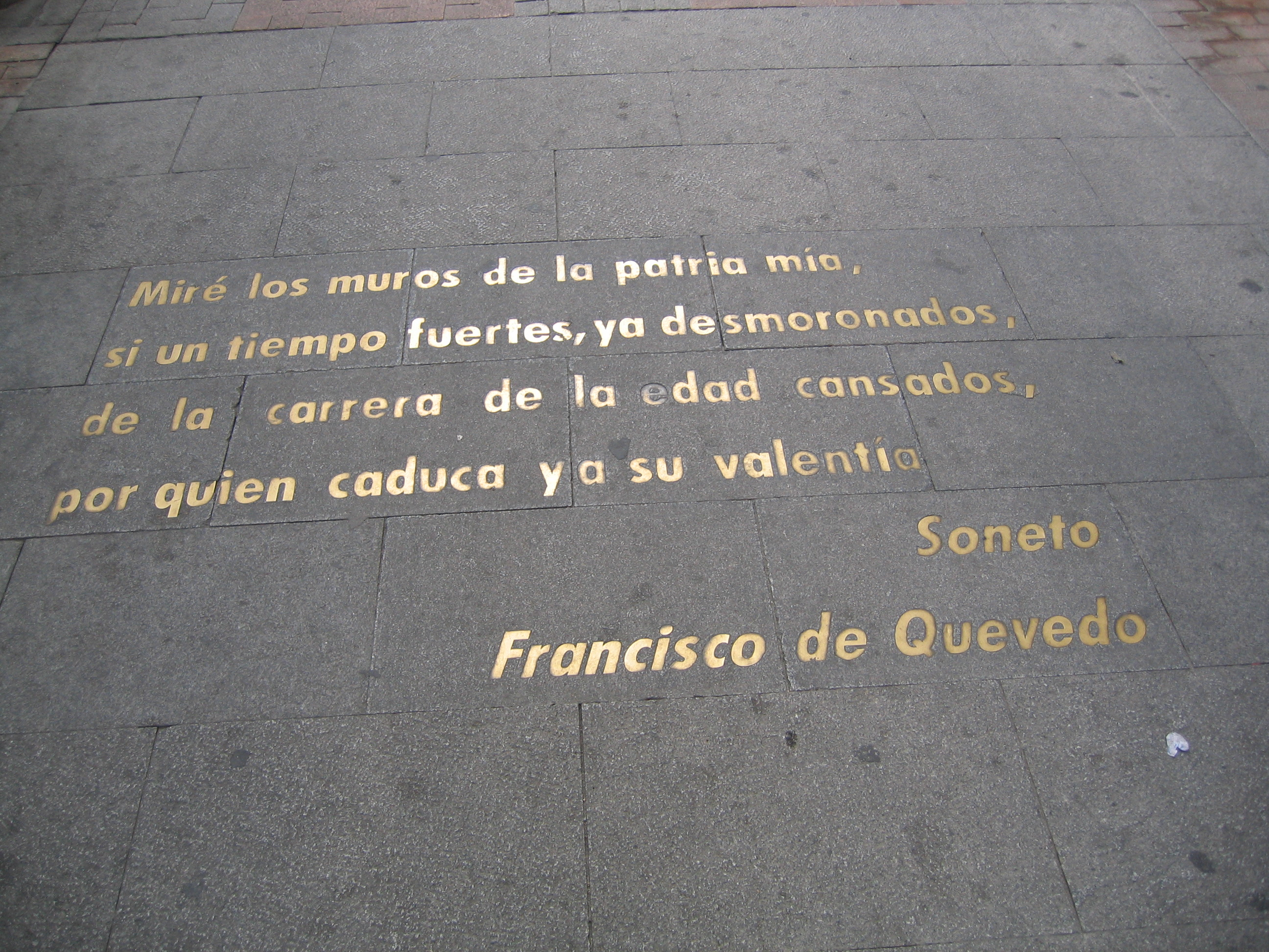 Calle de las Huertas, Madrid, España.